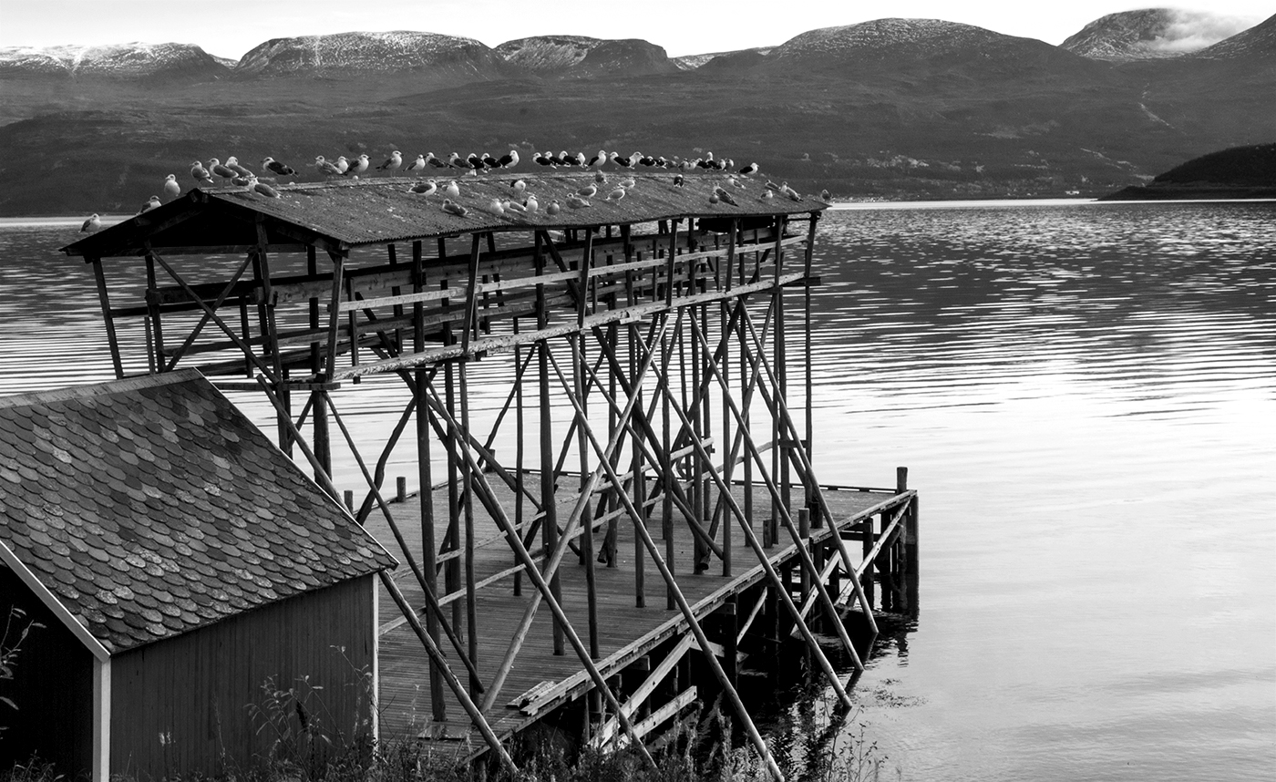 Fiskevær-sjøbruksanlegg i Storfjord, Troms. Datert 1900-tallet, andre kvartal. Konstruksjonen er et såkalt notheng, en anordning for å henge opp nøter til tørking.